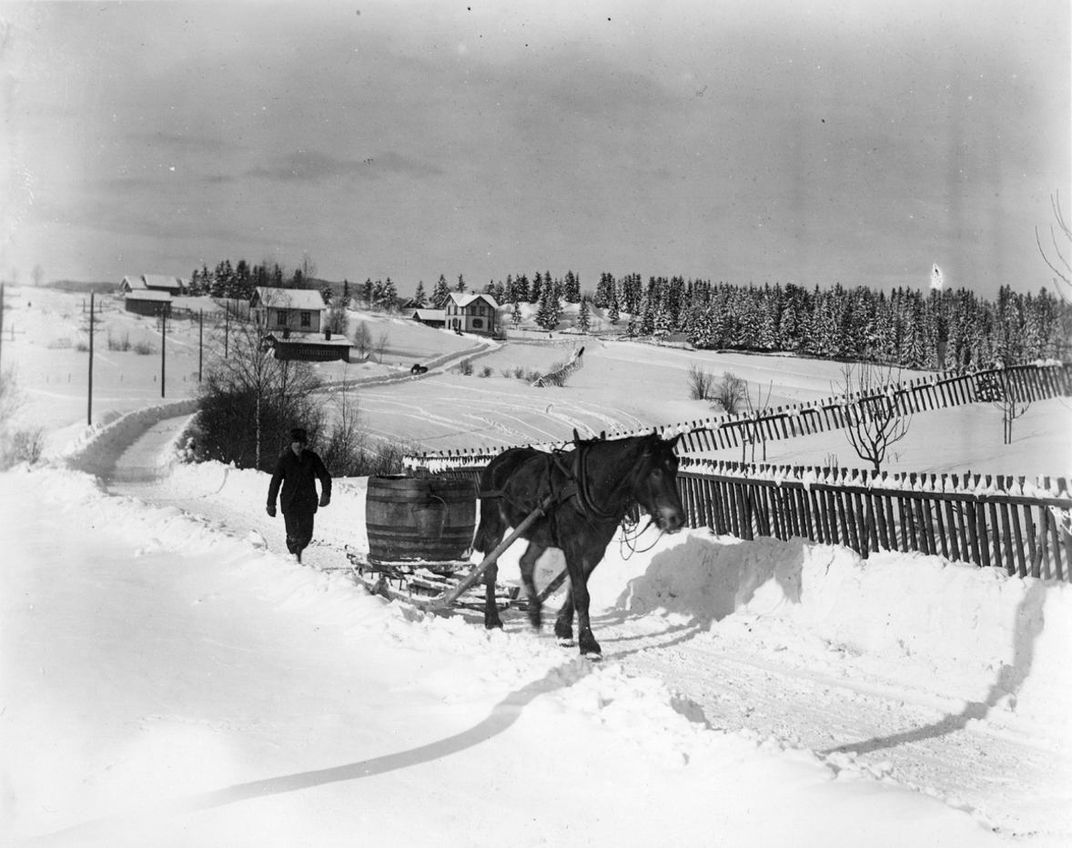 Sørkedalsveien på Røa fotografert av Anders Beer Wilse i 1902. I bakgrunnen smie tilhørende Holmsen og gamle Røa Handelsforening. Til høyre gjerdet på Huseby skole.